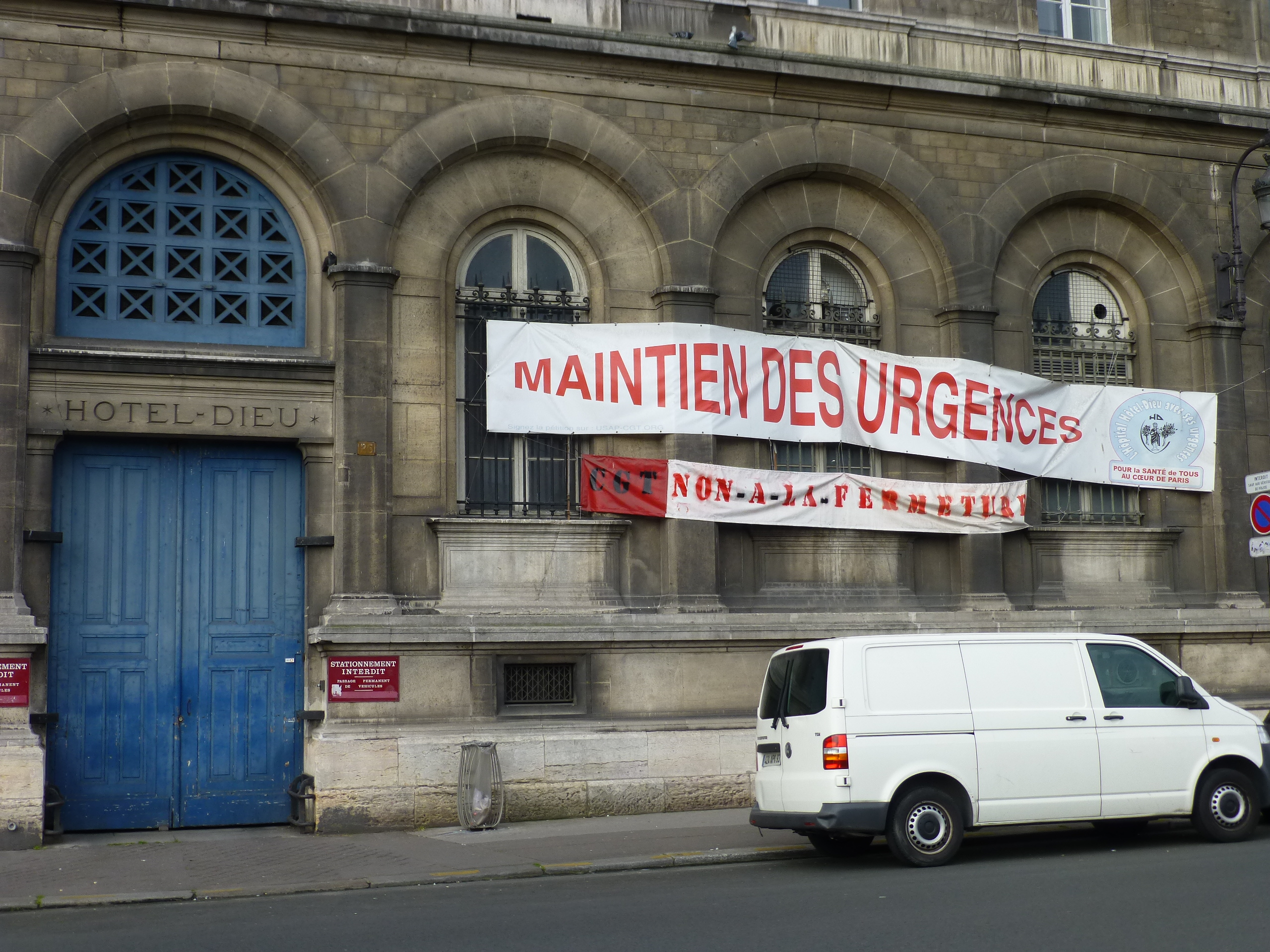 Paris, banderole sur la façade de l'Hôtel-Dieu : pour le maintien des urgences (mai 2016).